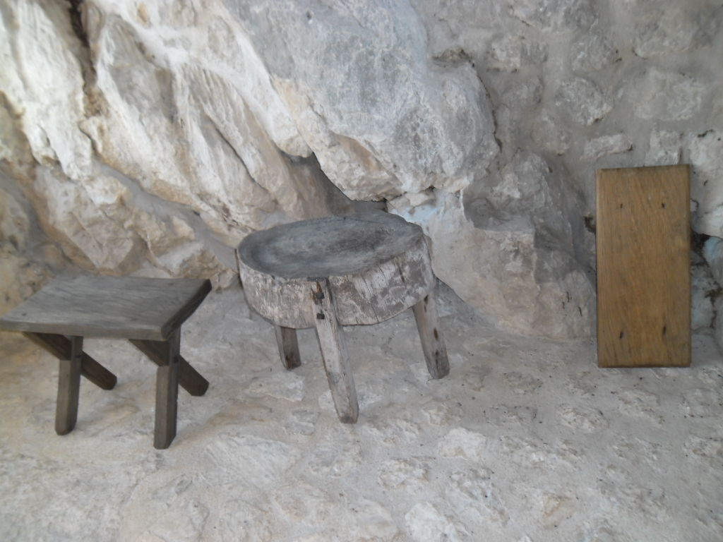 prizor iz Sokol-grada u Konavlima